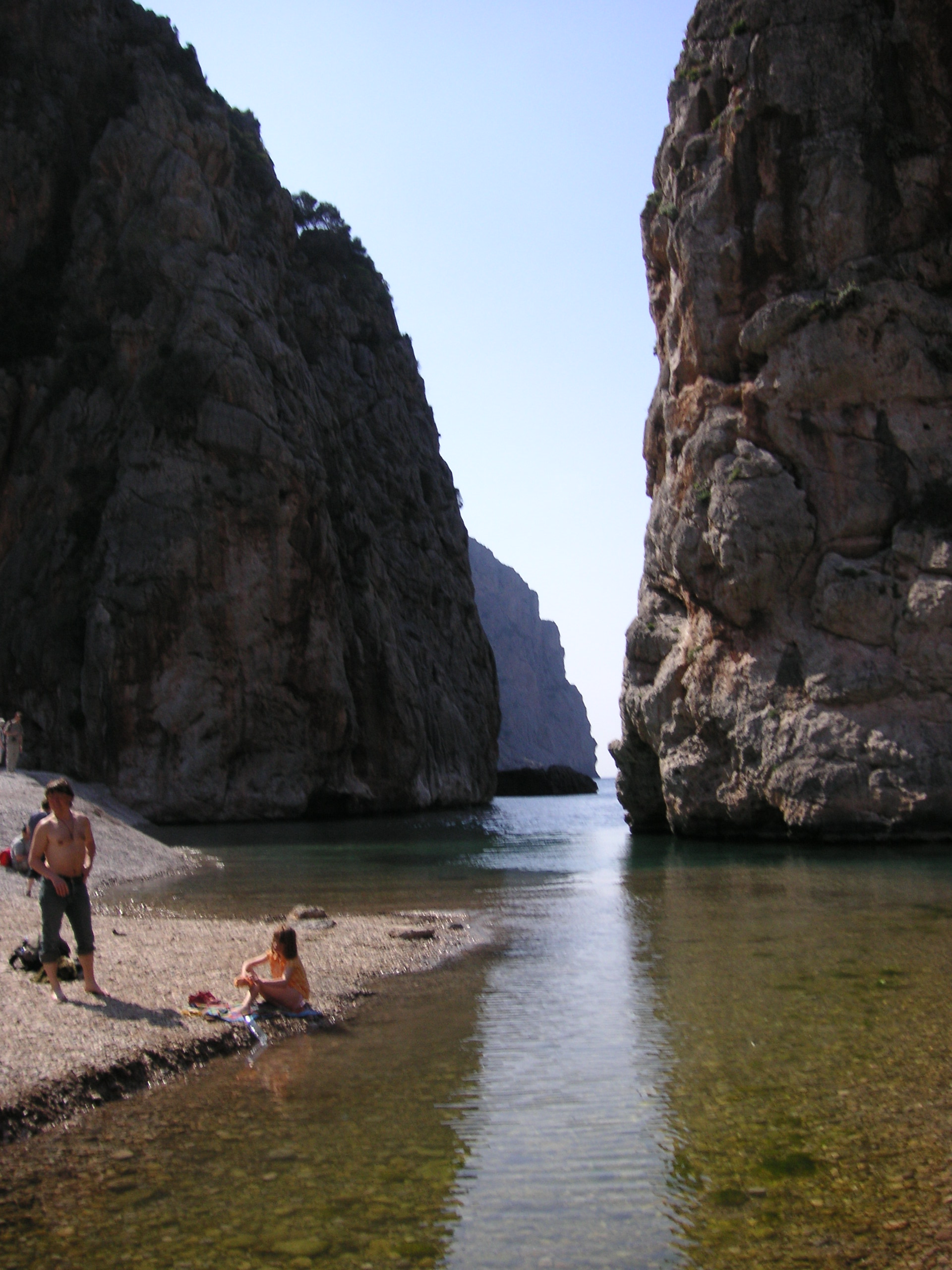 Sa Calobra, Mallorca.